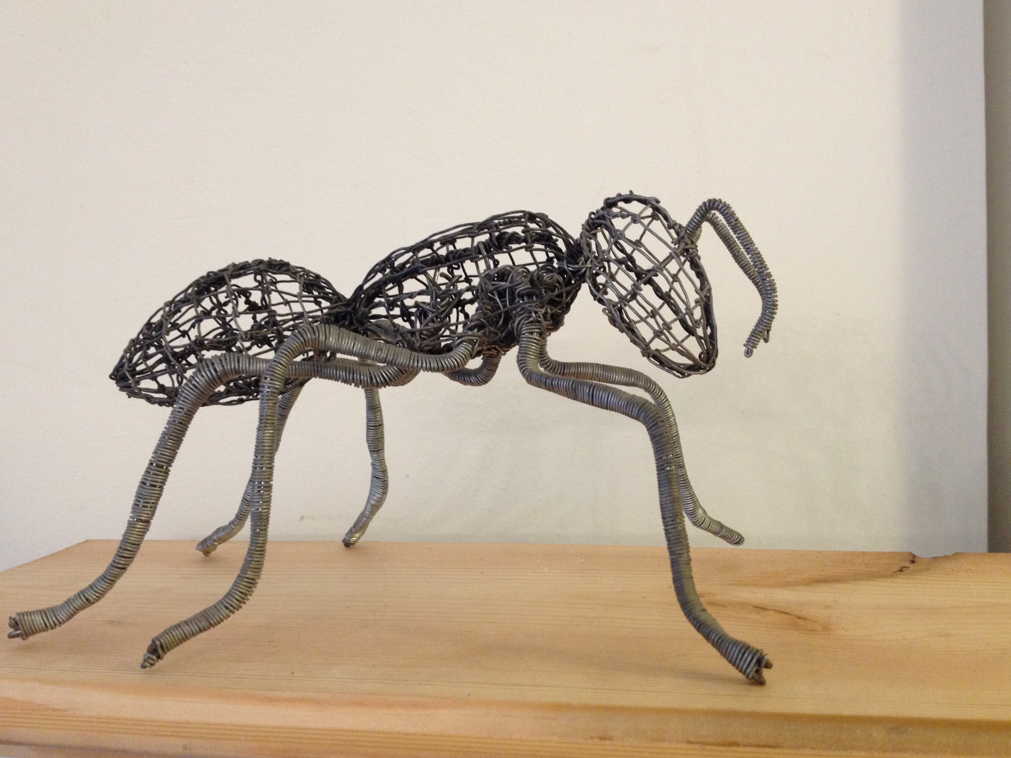 טכניקת Solid - עבודה על הפרטים הקטנים.